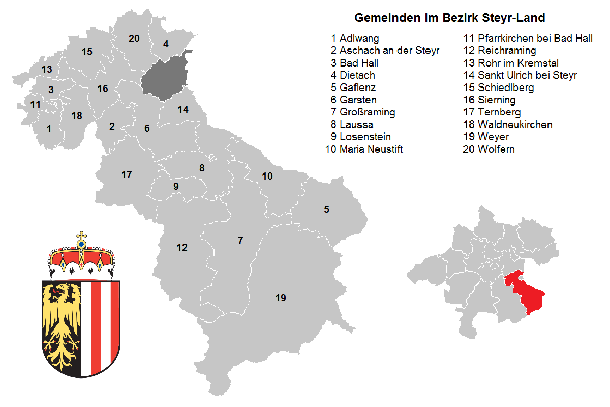 Bezirk Steyr-Land